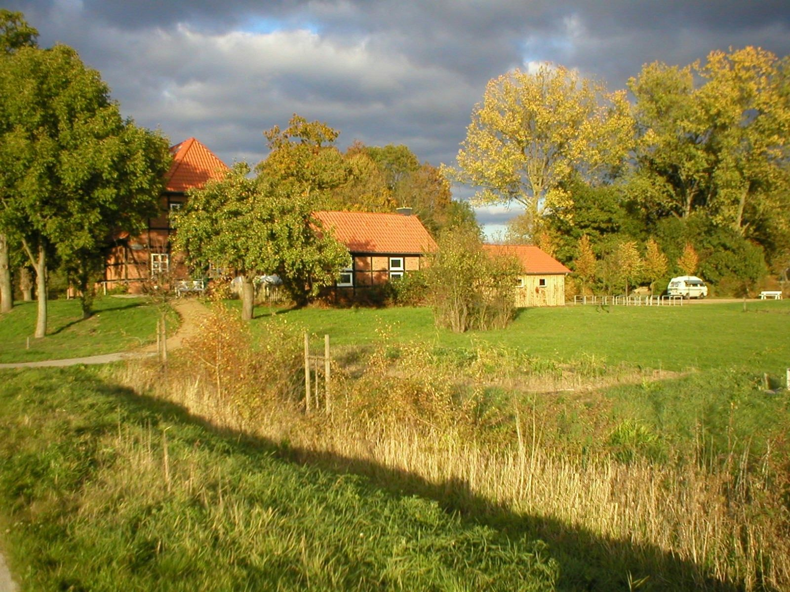 Informations- und Gästehaus Alte Schule Neu-Wendischthun, Cafe & Radlerherberge mit Ausstellung zur Geschichte der innerdeutschen Grenze